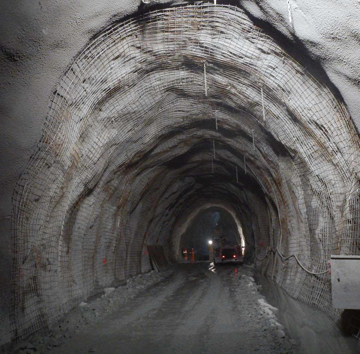 Albulatunnel, Sprengvortrieb Seite Spinas